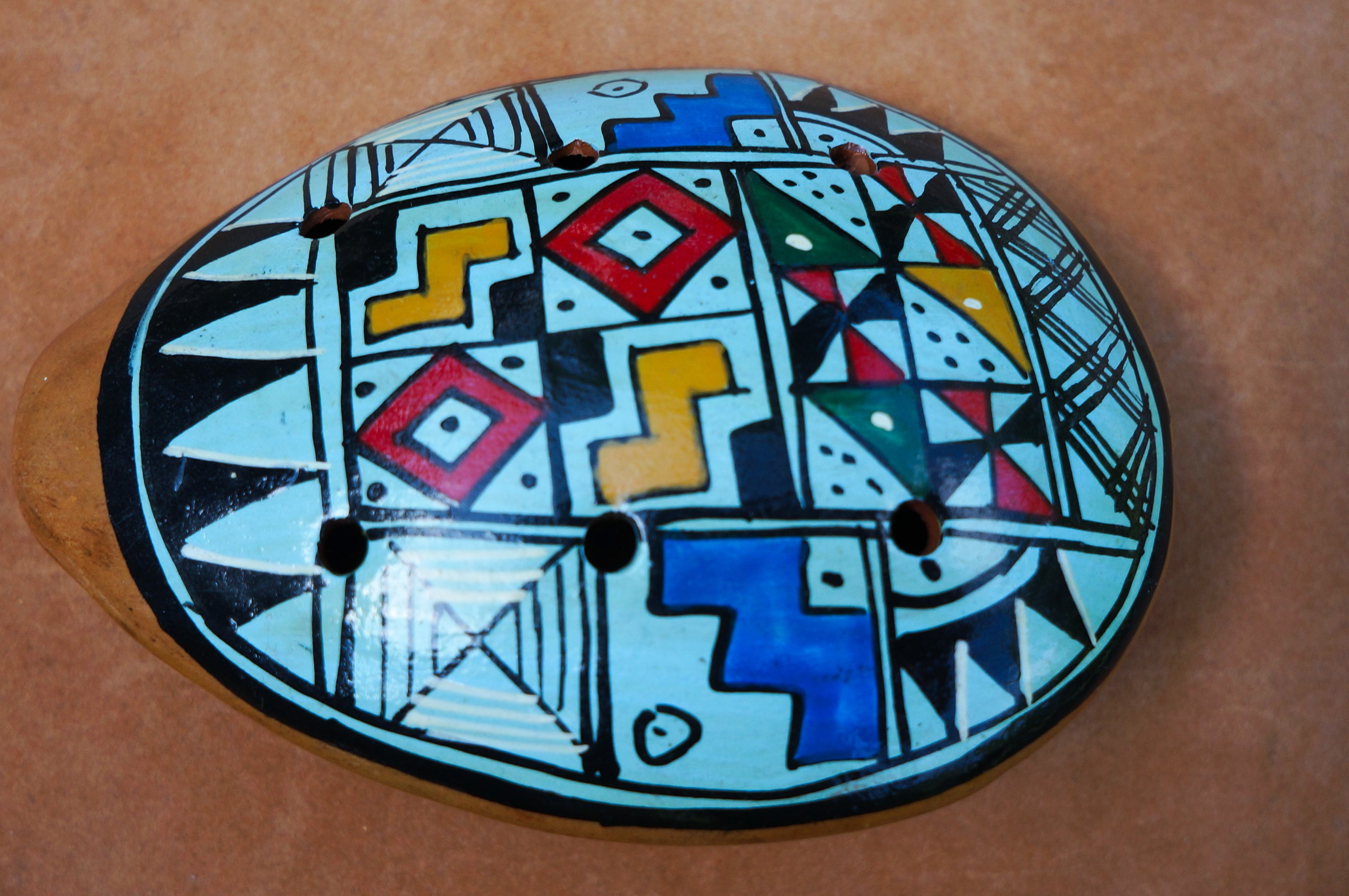 Ocarina en terre cuite acheté sur le marché de Mercado San Pedro, Cuzco au Pérou. L'instrument comporte 8 trous (6 au dos et 2 sur la face), il est peint à la main avec des dessins géométriques de couleur vert turquoise.